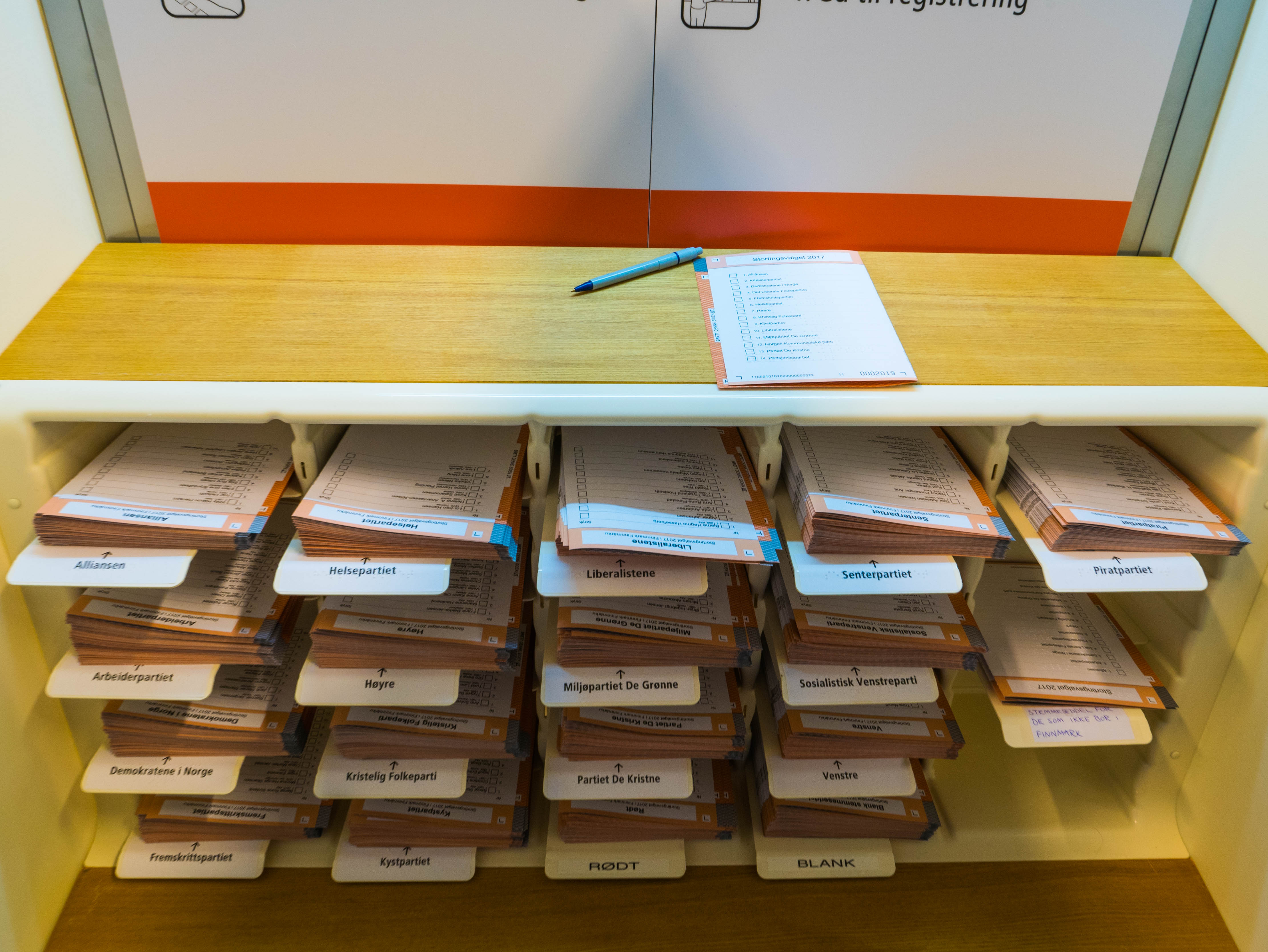 Norsk bod med stemmesedler.